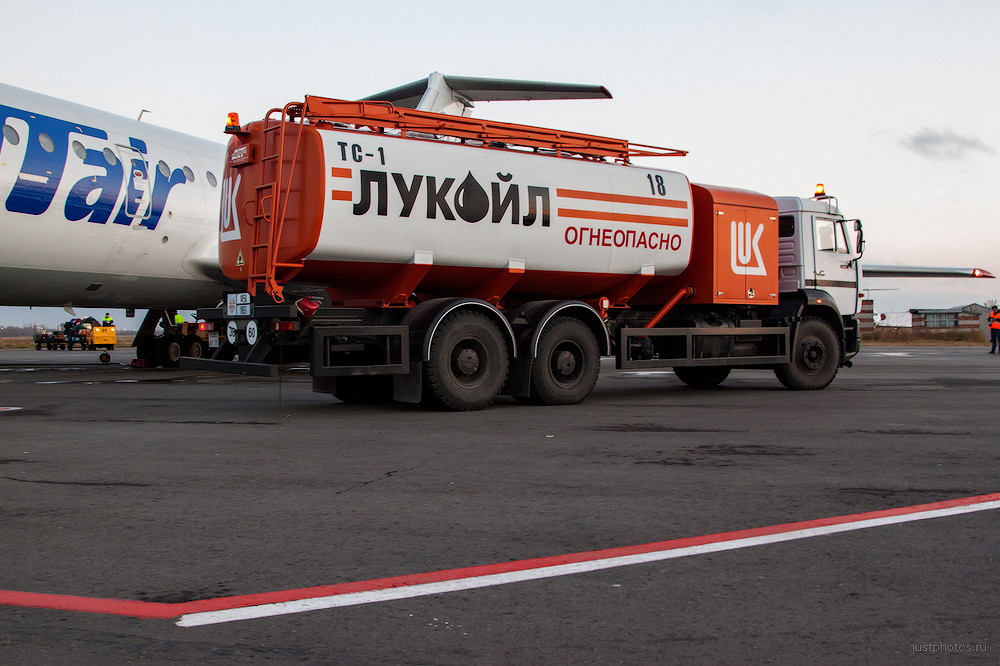 Топливозаправщик КАМАЗ в аэропорту Гумрак